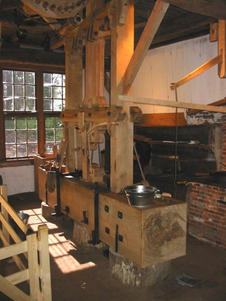 De slagbank in de ros-oliemolen van het Openluchtmuseum te Arnhem.